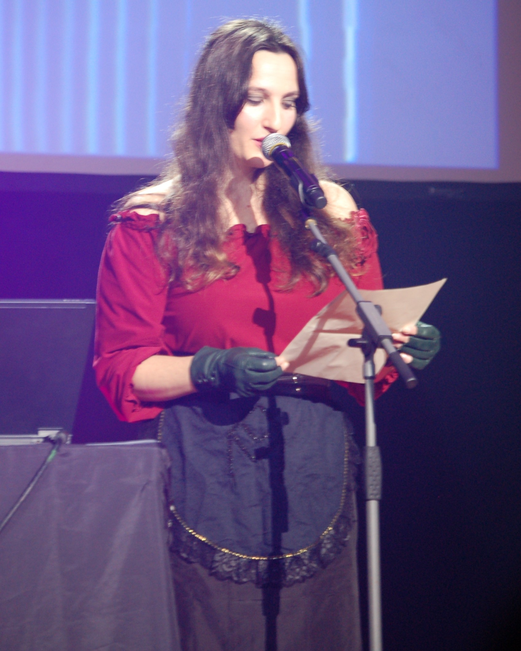 Estíbaliz Espinosa recitando Espinosa